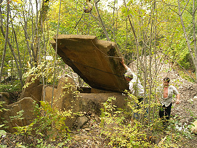 Восстановление майкопской археологической экспедицией под руководством А.Д.Резепкина при помощи автокрана порушенного перекрытия дольмена 39-2 (курган 39, погребение 2 - кенотаф). Клады. Долина фарса. Адыгея (РФ).